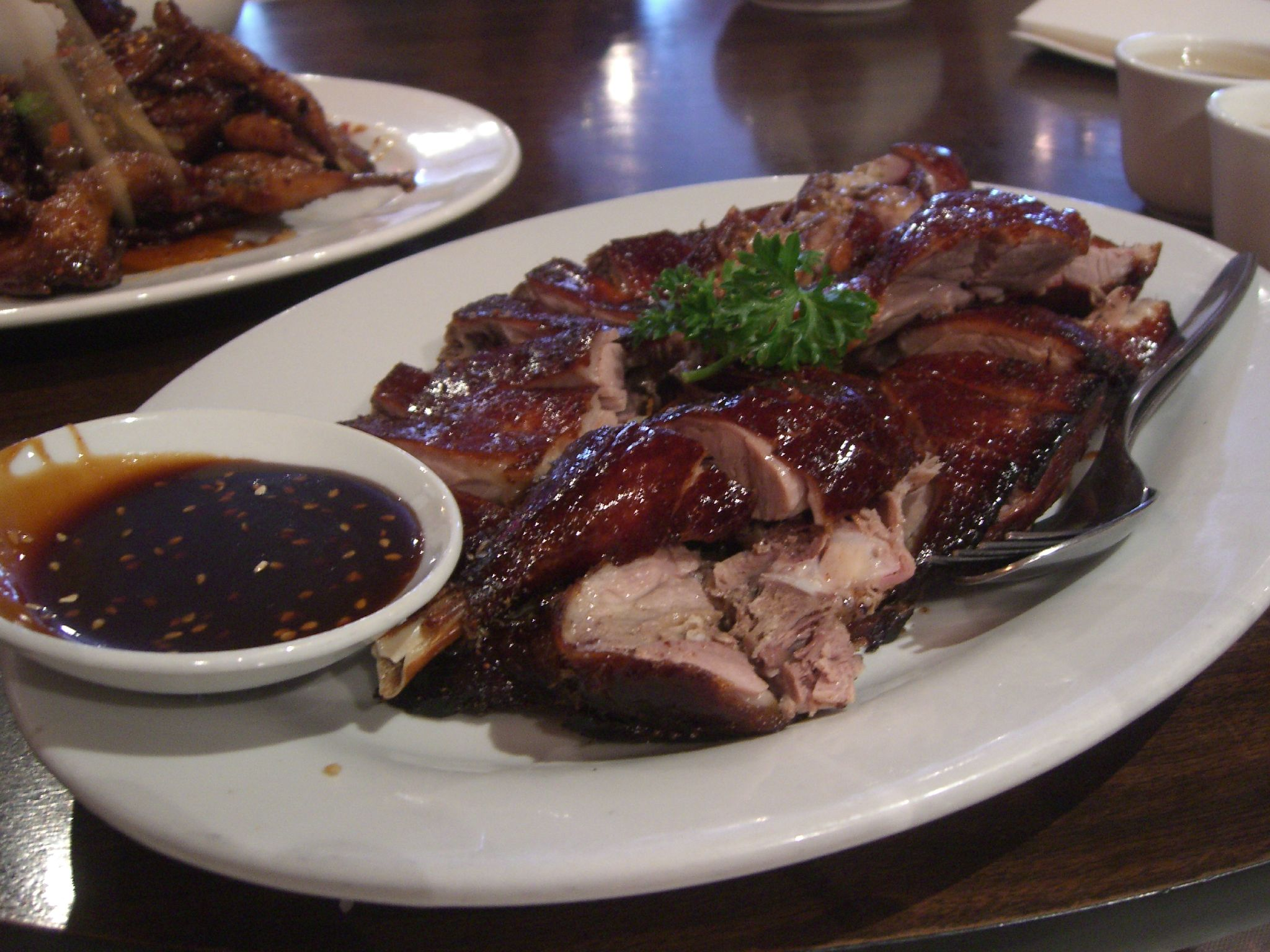 Pipa duck